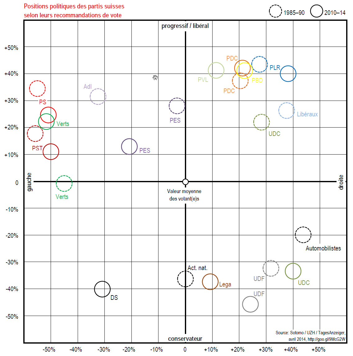 Positions politiques des partis suisses selon leurs recommandations de vote, 1985-90 et 2010-14. Selon les données de Sotomo / UZH et la graphique du Datenblog du TagesAnzeiger, 21 avril 2014.